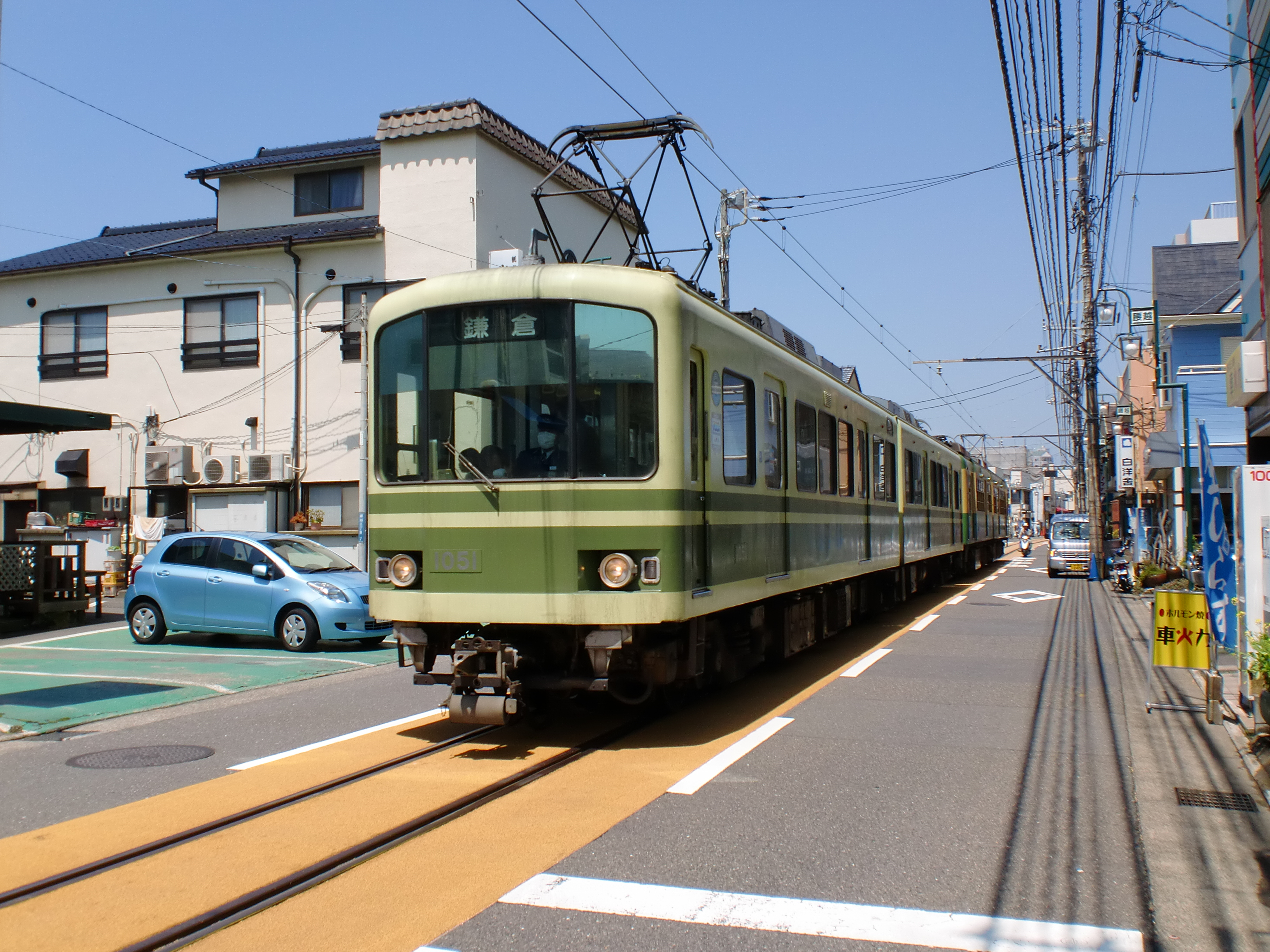 江ノ島電鉄の江ノ島駅腰越駅間の併用軌道